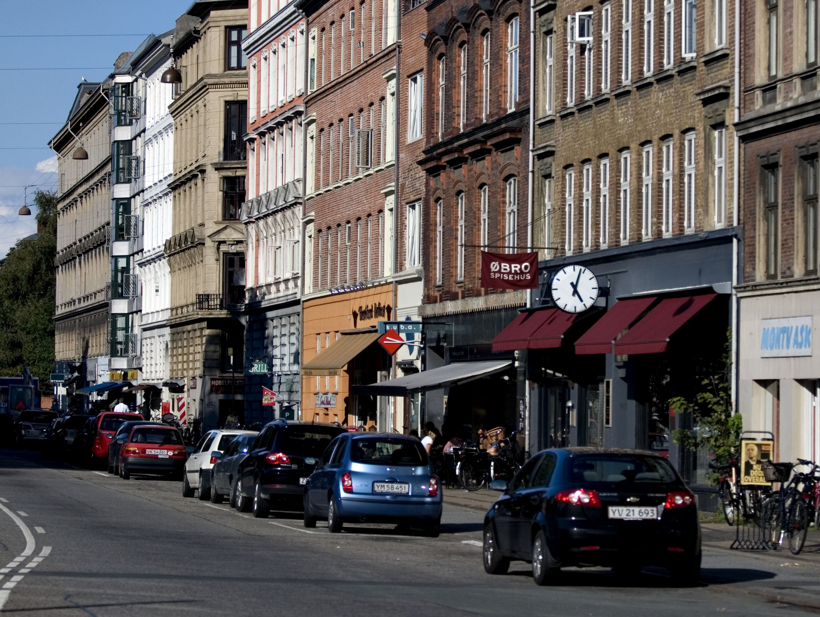 Sticks'n'Sushi on Øster Farimagsgade in Copenhagen, Denmark